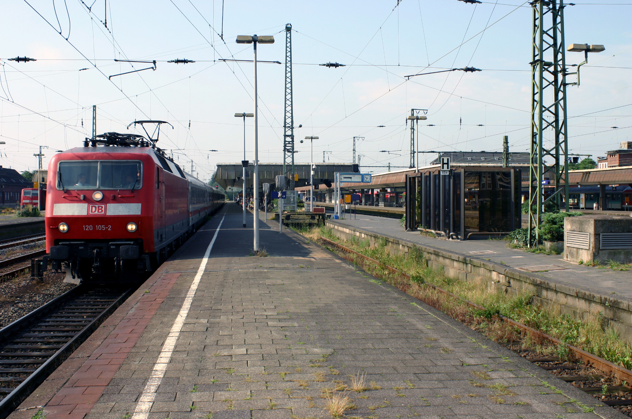 Der IC 2333 verlässt Münster Hauptbahnhof zur Fahrt nach Emden Hbf